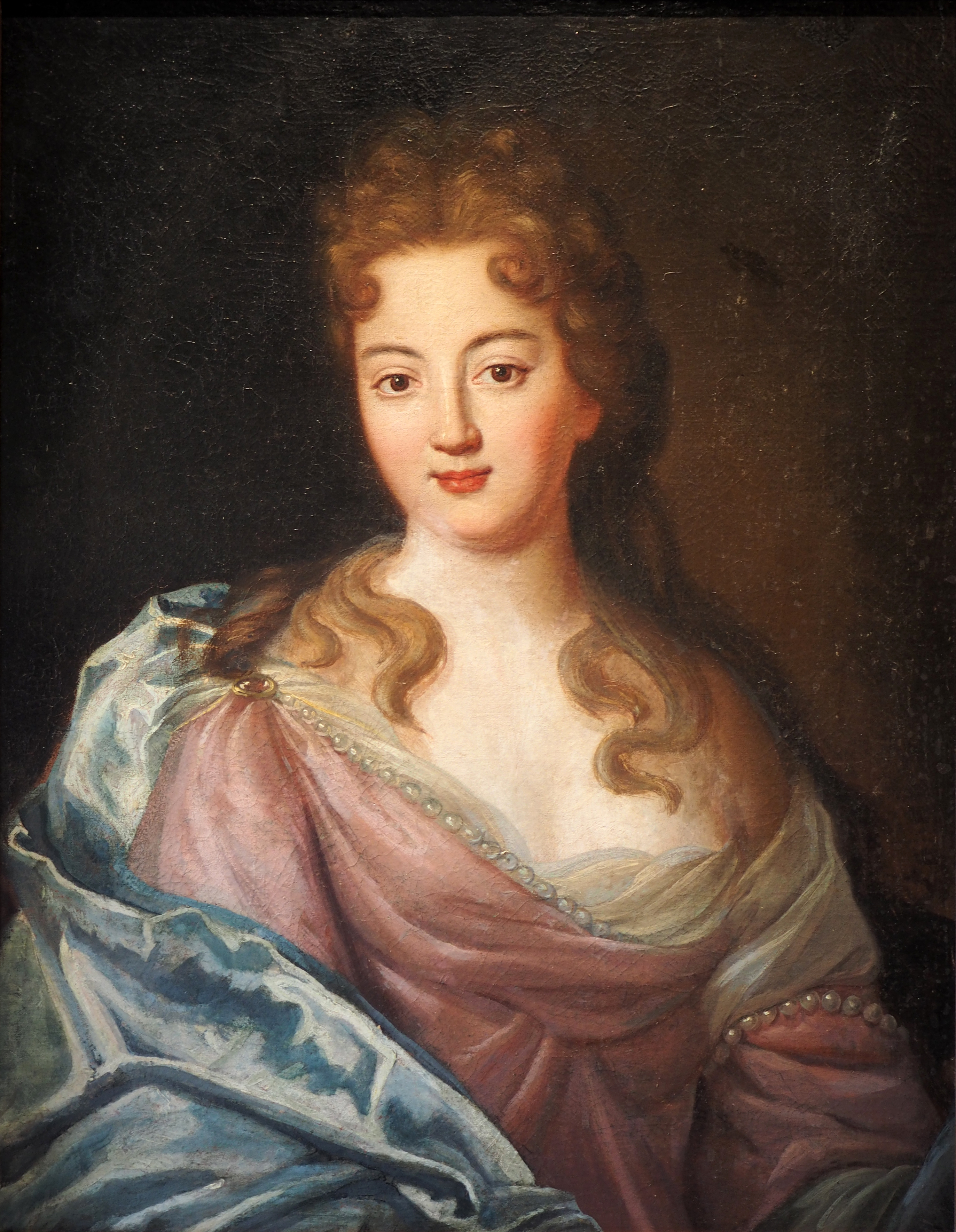 1938 erfuhr die Stadt Celle von einem Gemälde von der jungen Eleonore d'Olbreuse das sich im Besitz deren Nachfahren befand. Im August 1938 begann der Celler Oberbürgermeister mit Madame Desmier d'Olbreuse, wegen eines Verkaufs des Bildes zu verhandeln. Sie war zum Verkauf bereit, forderte aber 350.000 Französische Franc (nach seinerzeitigem Umrechnungskurs 24.445 Reichsmark (RM). Die Celler hielten den Preis für indiskutdabel. Die Direktoren des Pariser Louvre und der Gemäldegalerie des Berliner Kaiser-Friedrich-Museums, heute Bode-Museum schätzten den Wert auf 500 bis 600 RM. Der Handel scheiterte zunächst. Nach dem zwischen dem Deutschen Reich und Frankreich geschlossenen Waffenstillstand 1940 war Madame d'Olbreuse bereit das Gemälde für 50.000 Franc (2.500 RM) und eine Kopie des Bildes abzugeben. Die Vermittlung führte der in Frankreich statonierte Otto Marloh, Hauptmann der Deutschen Wehrmacht. Georg Schnath, Archivar aus Hannover, damals Archivschutzoffizier in Frankreich, nahm das Gemälde in Empfang und ließ es nach Celle bringen. 1947 wurde der Erwerb des Gemäldes von den Alliierten beanstandet. 1954 erhielt die Stadt Celle das Bild zurück, die Ermittlungen dazu laufen aber noch. 2018 wurde das Gemälde für mehrere Monate als Leihgabe in Frankreich ausgestellt.